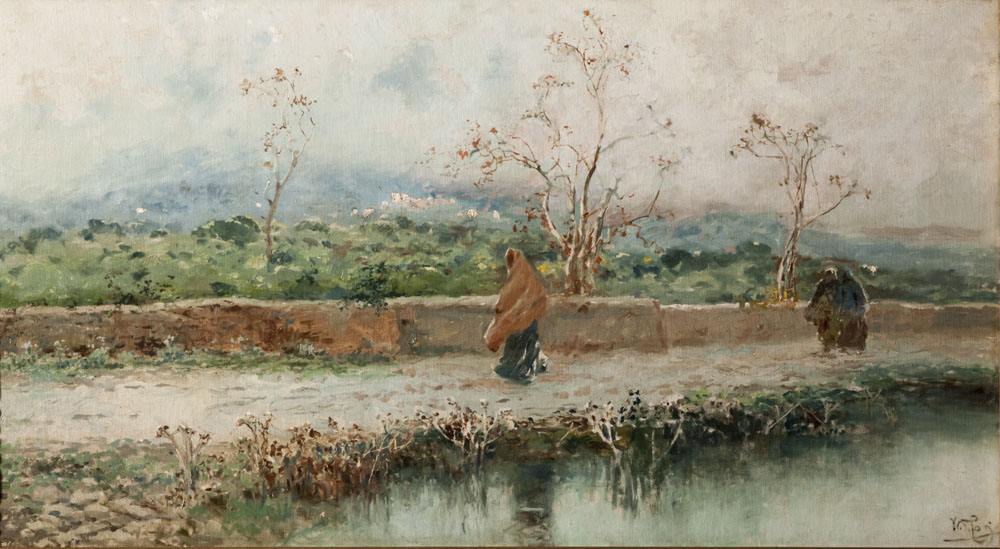 Olio su tela, 68,5 x 131 cm, coll. privata